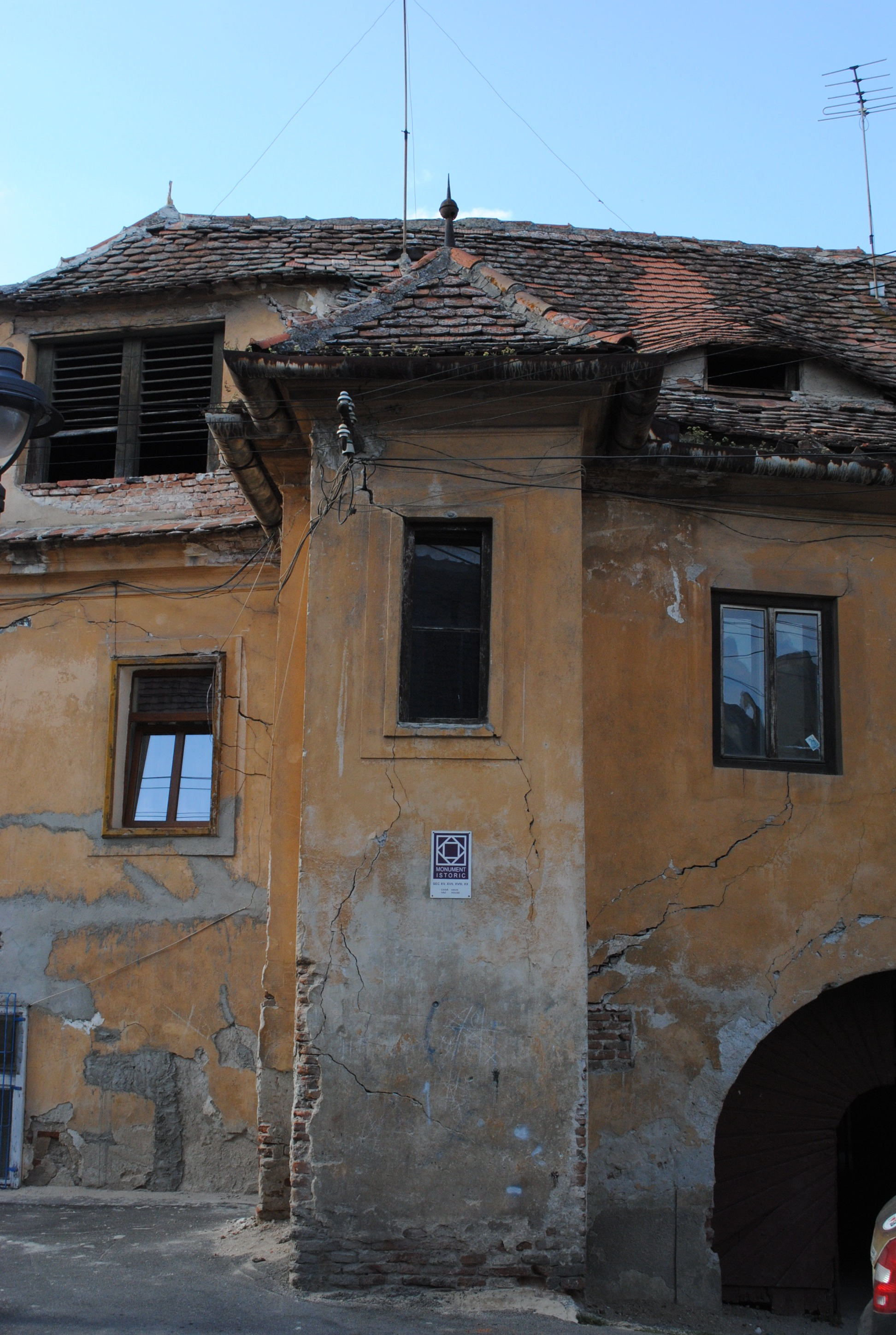 Casă, sec. XV,1650 - 1700, 1794, sec. XX